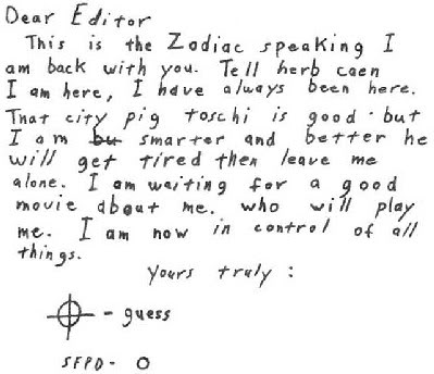 fs